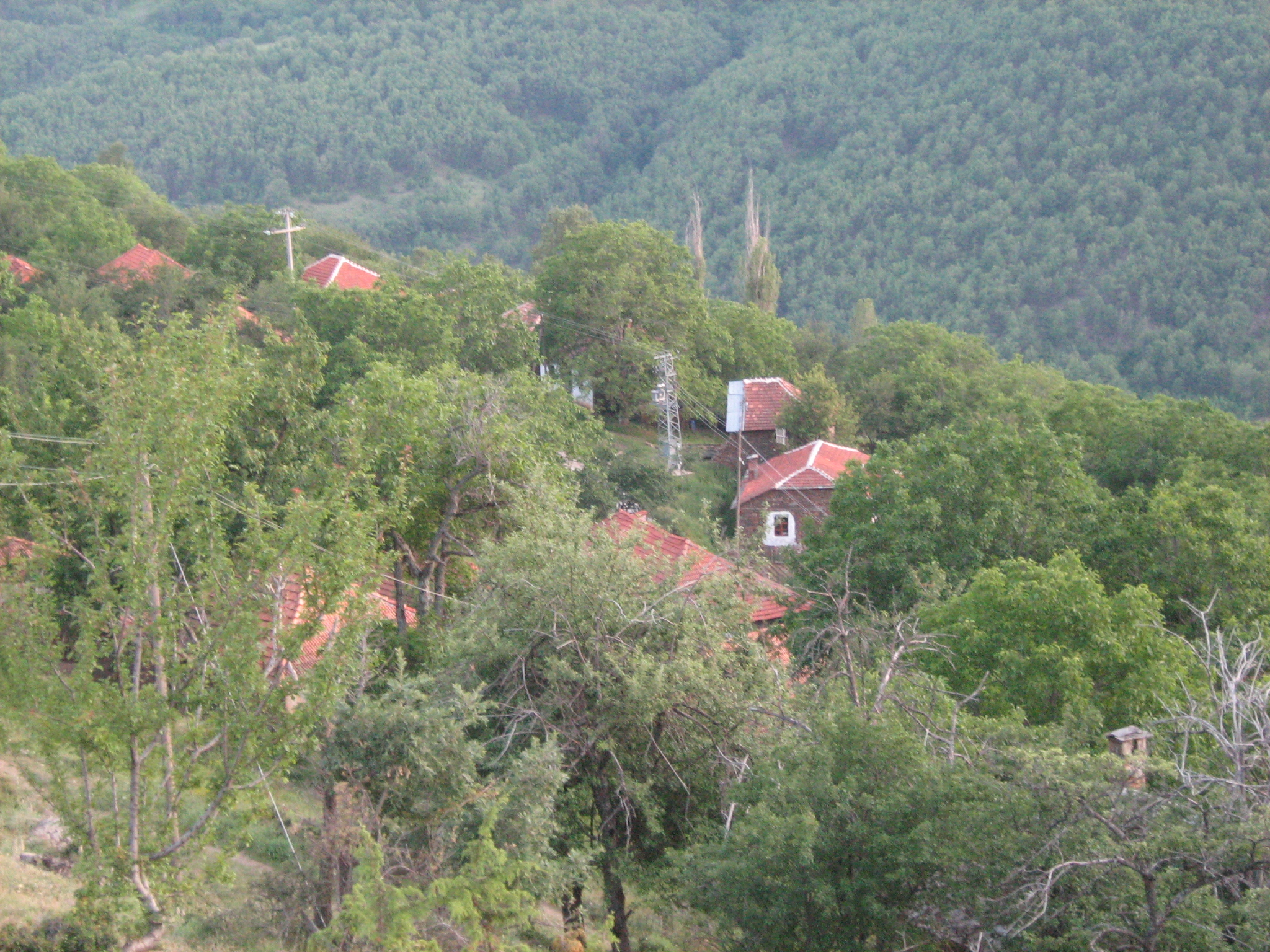 Selo Kosovo, Makedonski Brod